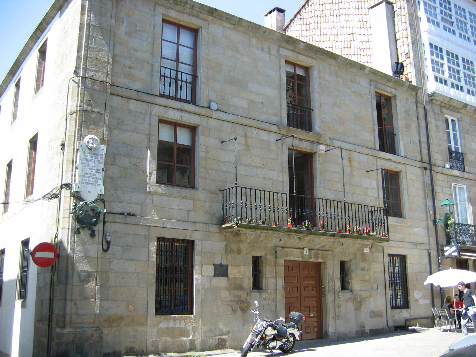 Sede do Instituto da Lingua Galega (Santiago de Compostela). Foi casa natal de Antonio López Ferreiro.